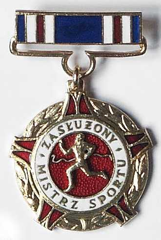 Знак к званию "Заслуженный мастер спорта" Польши